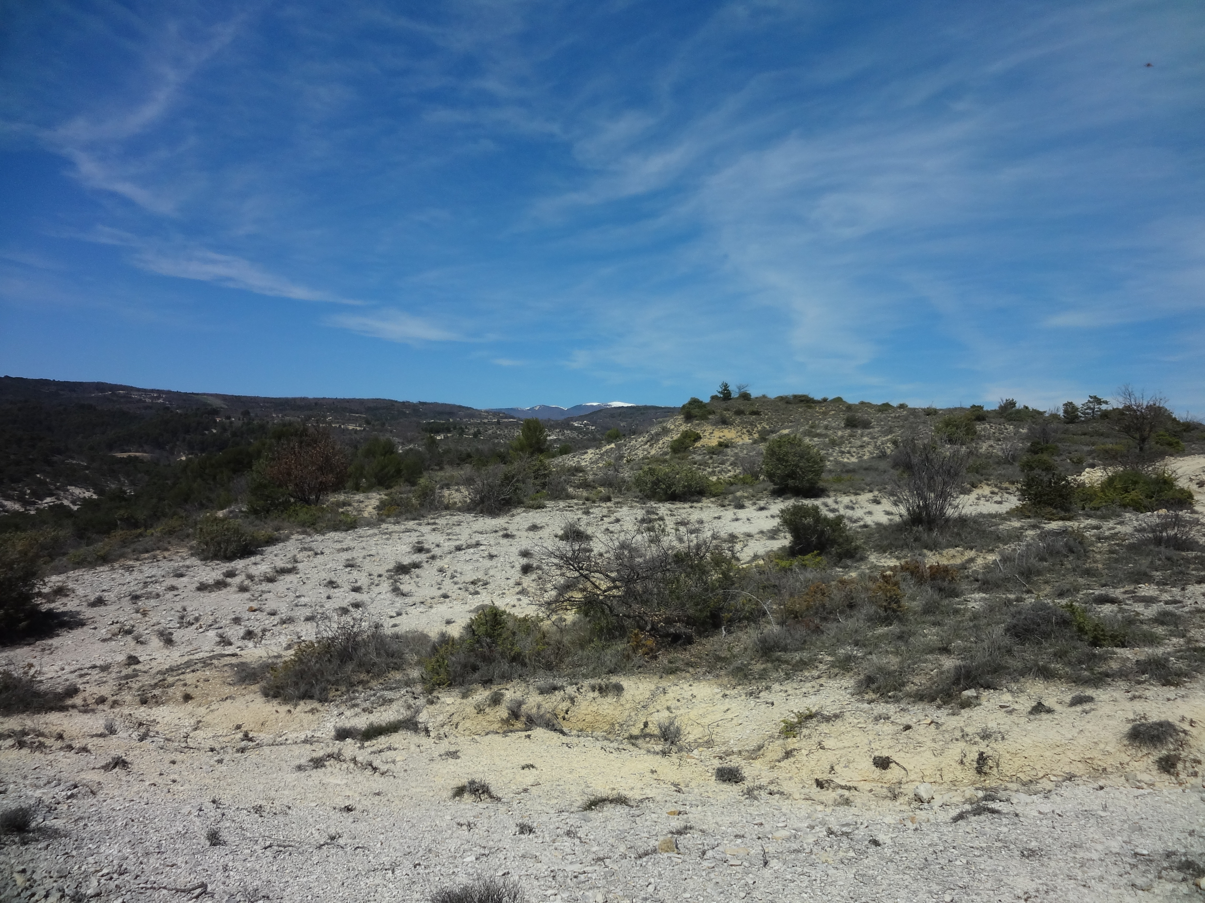 Plaine de Notre-Dame, à Sigonce